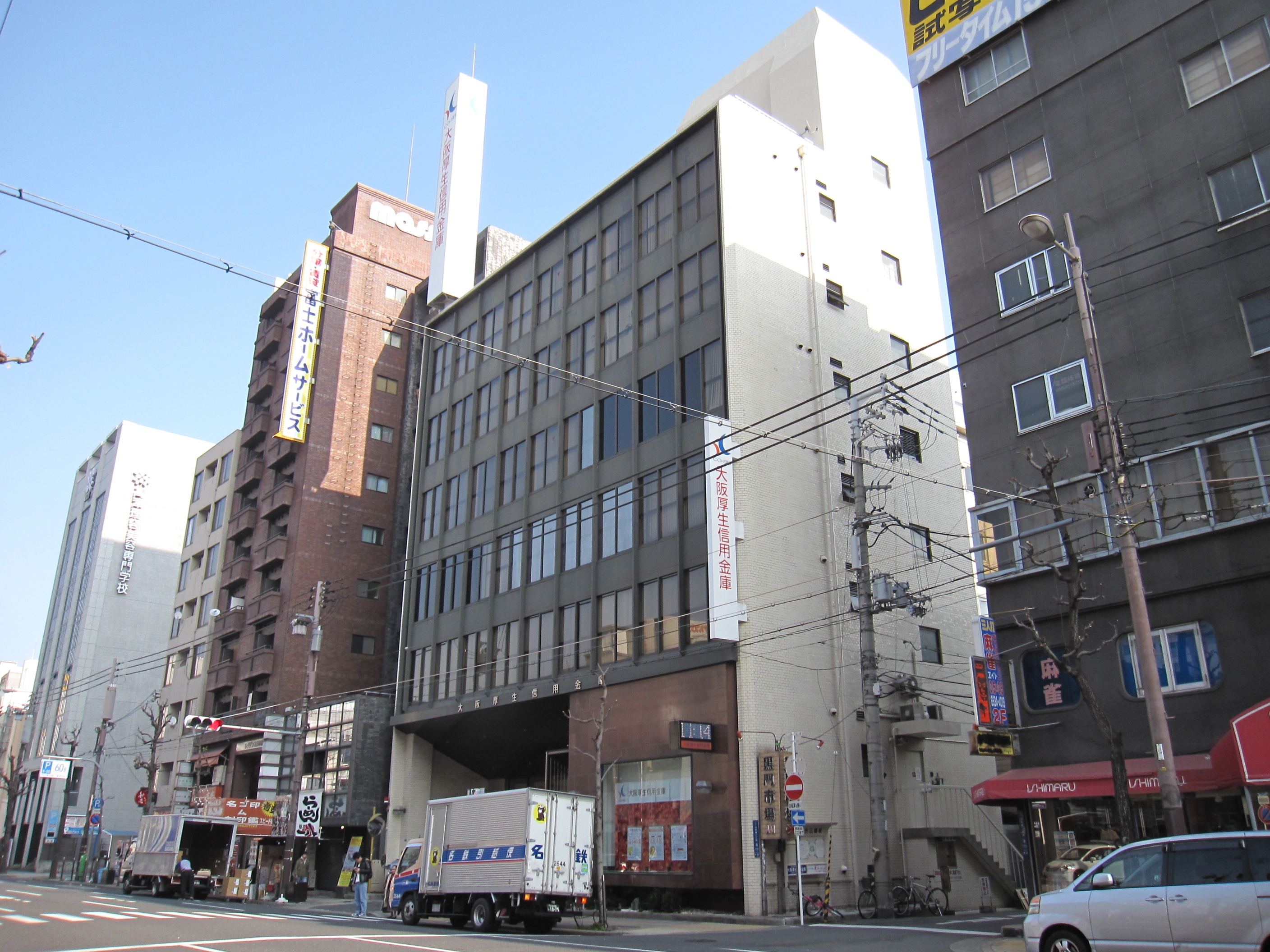 大阪厚生信用金庫本店